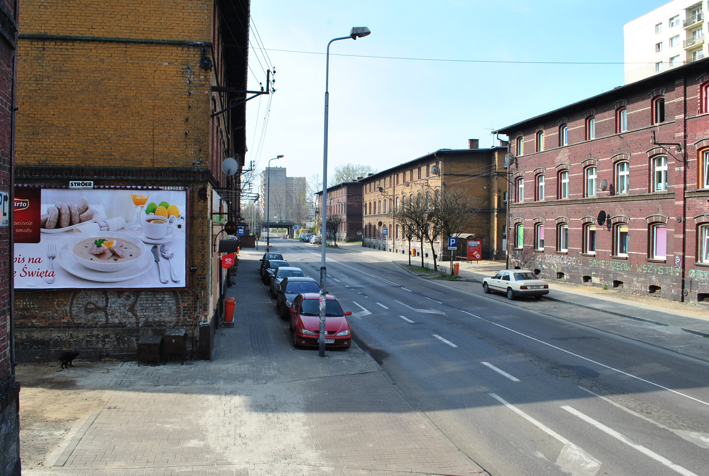 Katowice - Załęże. Ulica Wiśniowa (widok w kierunku południowym)